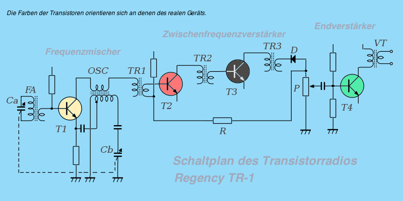 Vereinfachter Schaltplan des Transistorradios TR-1 (deutsche Übersetzung der tschechischen Version von Sibalio, ).